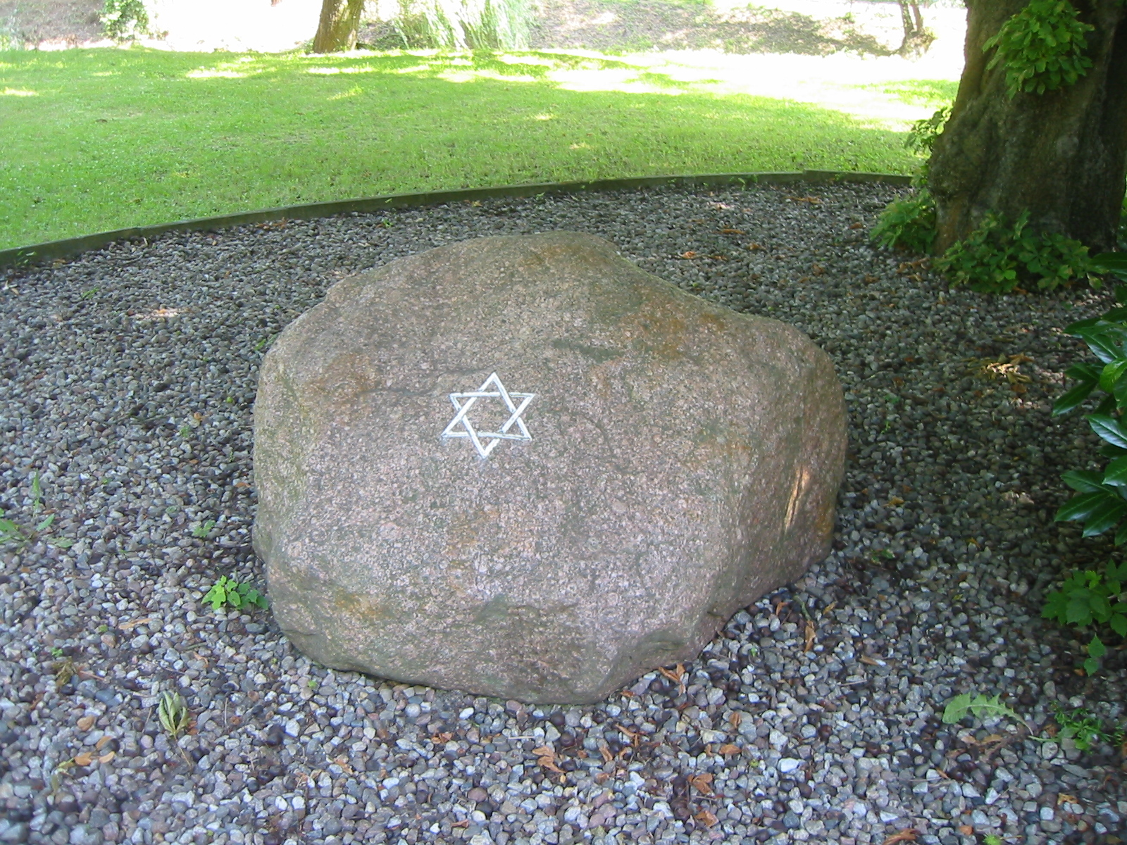 Gedenkstein an den ehemaligen Standort der Synagoge in der Kastanienpromenade in Guben, heute Ulica Dabrowskiego in Gubin